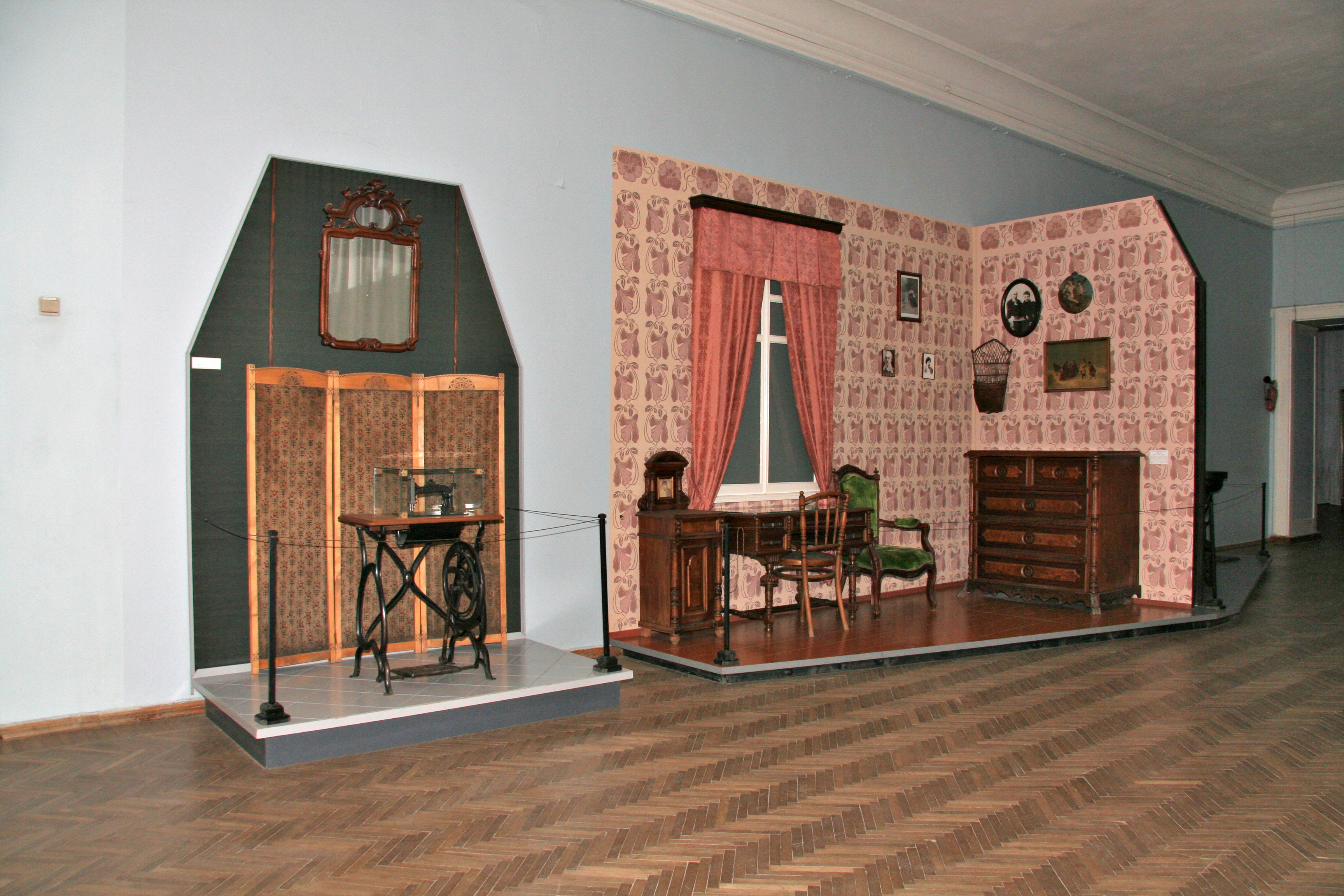 Полтавський кразнавчий музей_Зал № 15